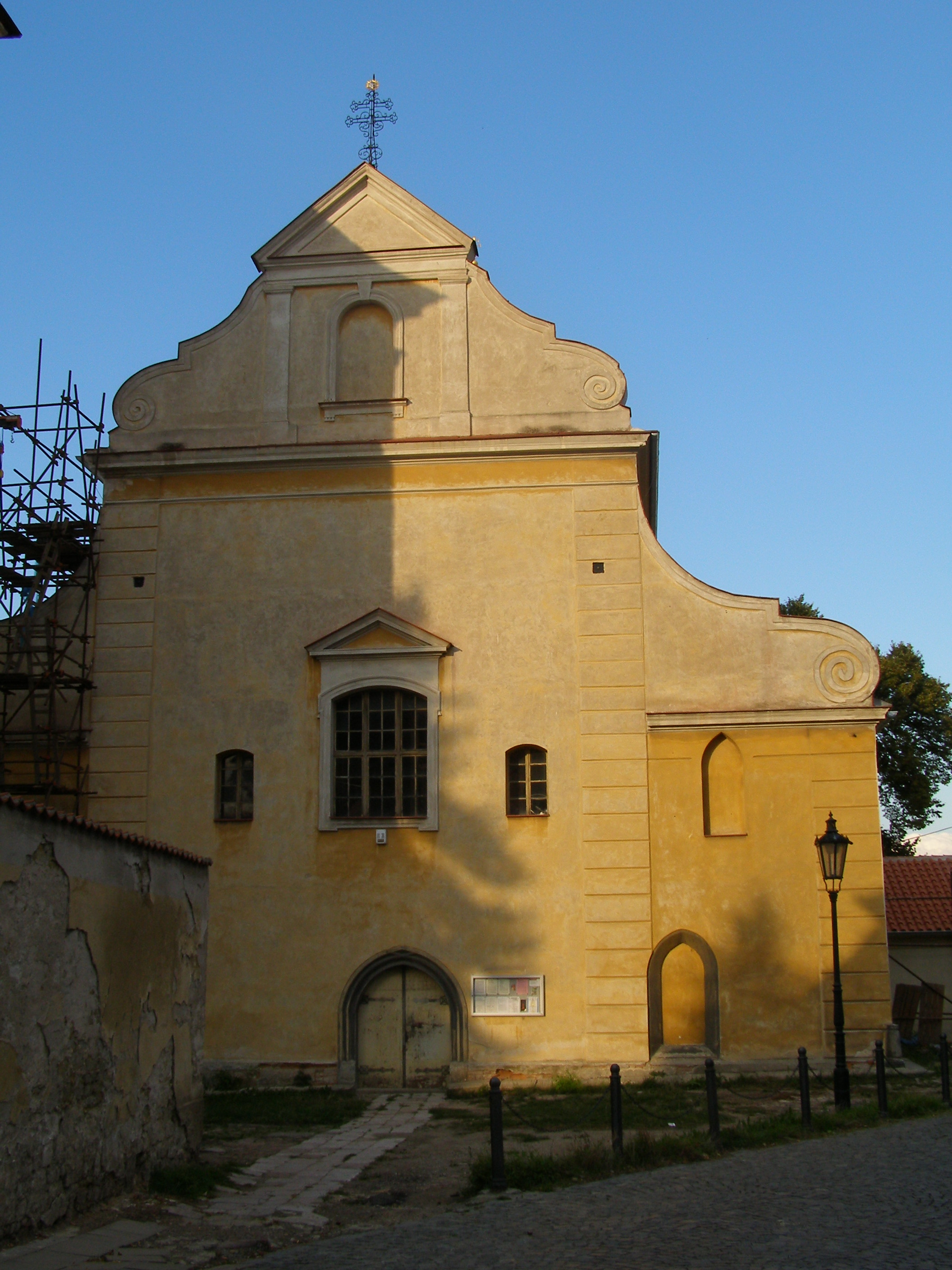 Kostel Obrácení sv. Pavla (Brandýs nad Labem), F. X. Procházky 162, Brandýs nad Labem